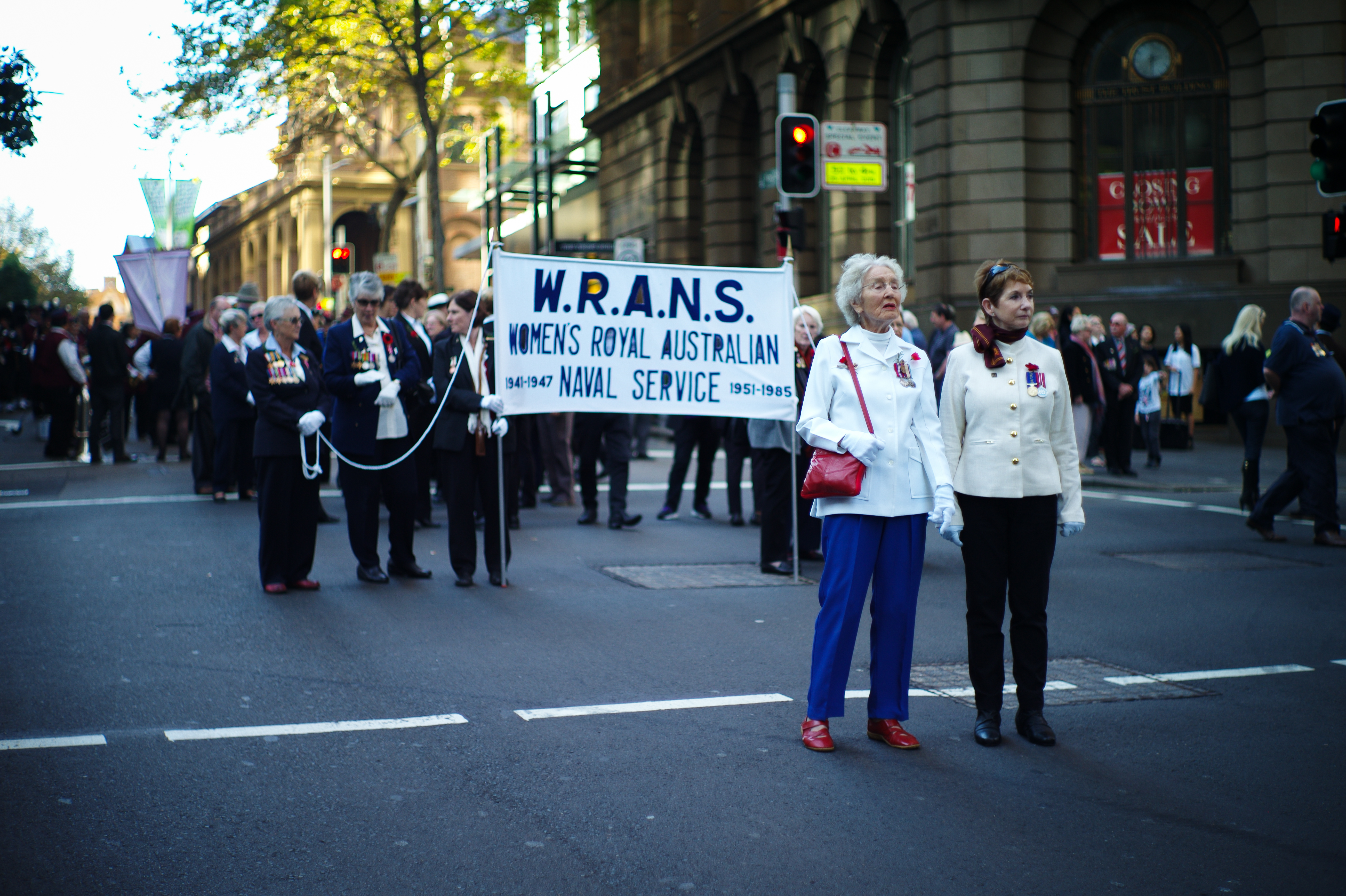 Sydney 2015 Anzac Day march